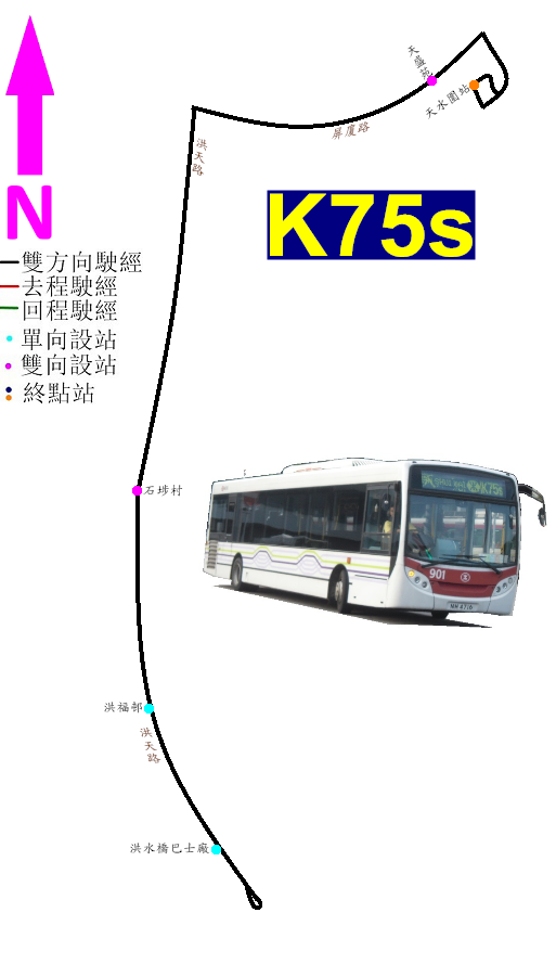 中文（香港）: 港鐵巴士K75S線的走線圖